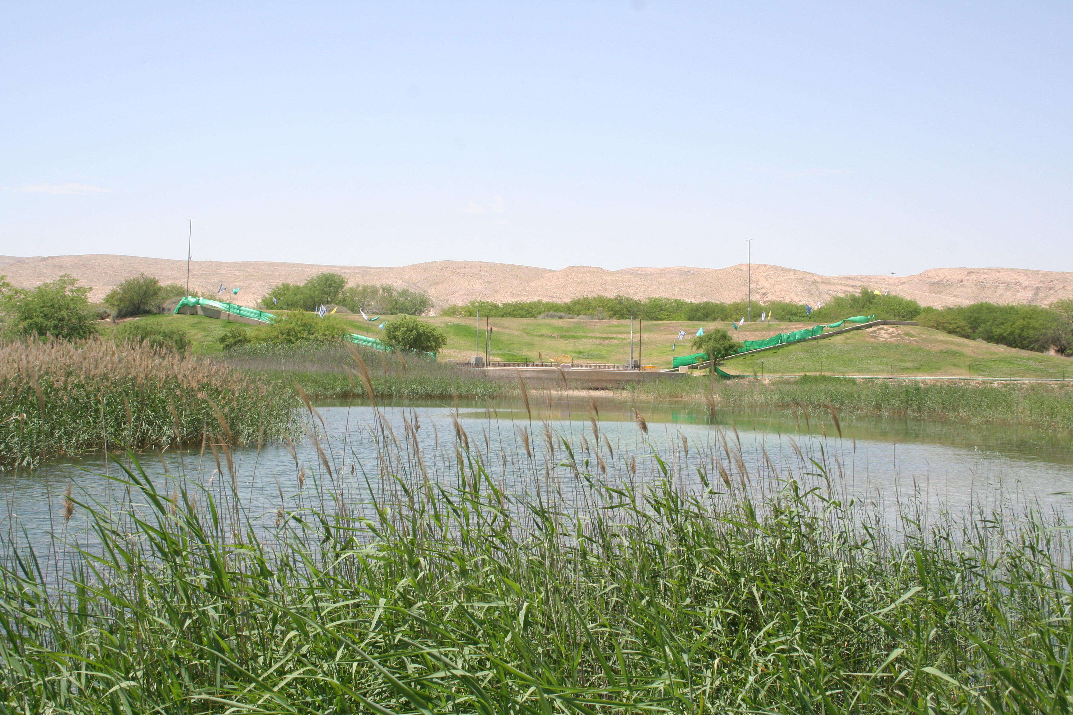 אגם ירוחם בפארק אגם ירוחם